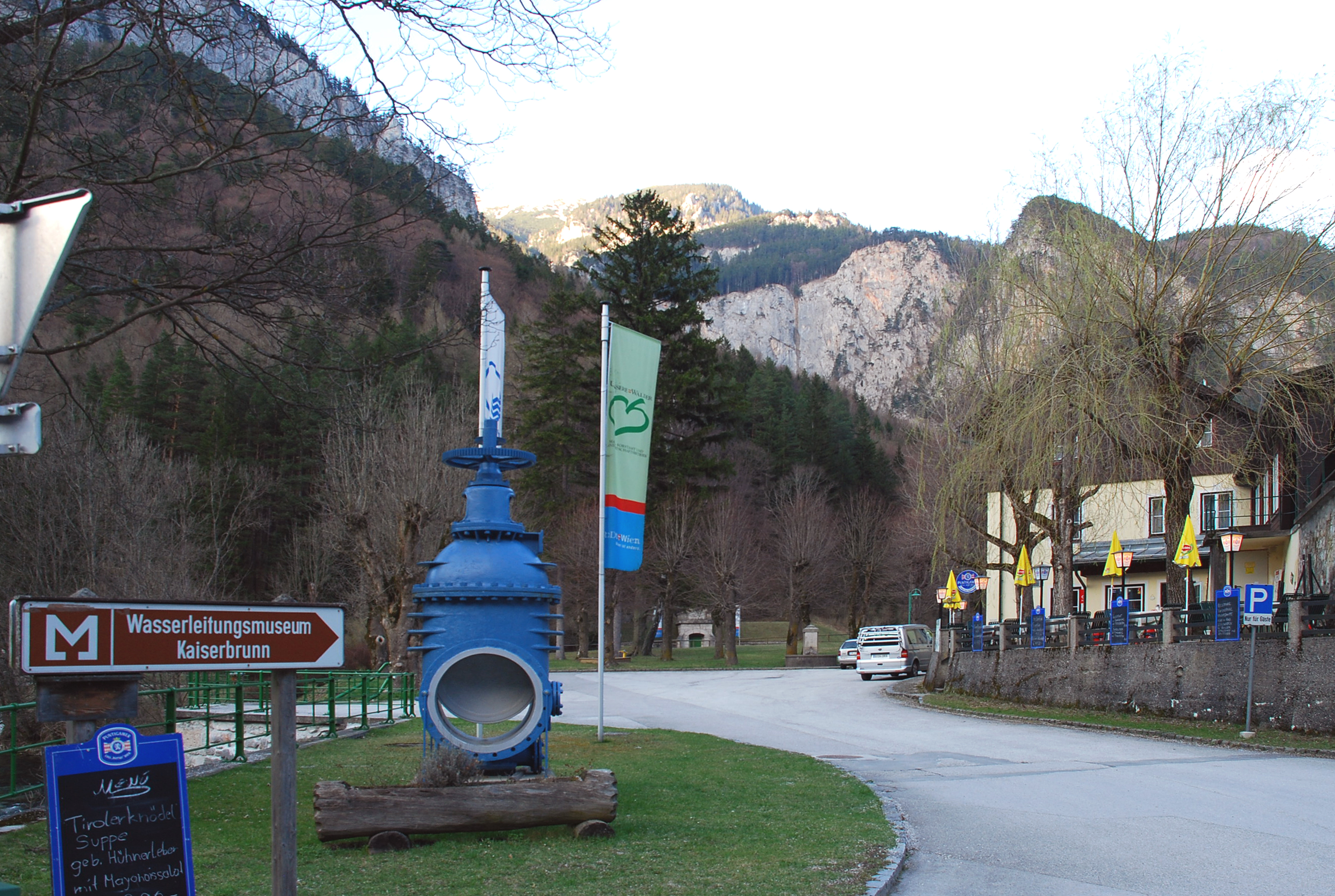 Felswände des Wasserofens (Felskar mit dem Namen „Ofen“) im Hintergrund von Kaiserbrunn am Tal der Schwarza in Niederösterreich zwischen Rax und Schneeberg (Höllental)